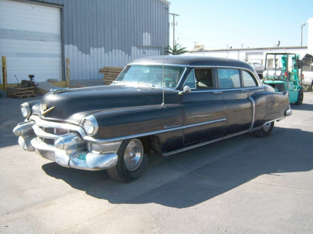 1953 Cadillac limousine